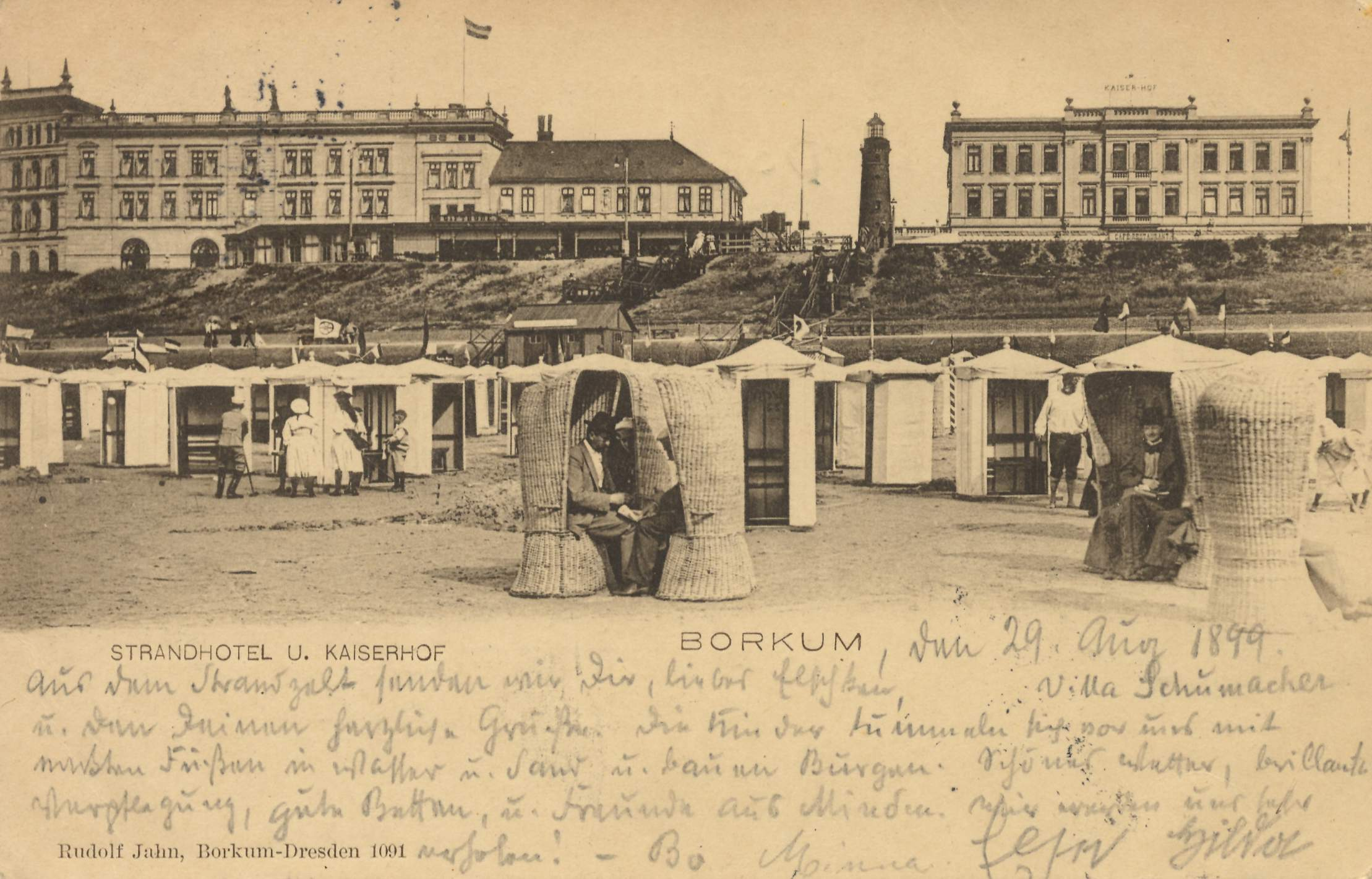 Strandhotel und [Hotel] Kaiserhof, Borkum